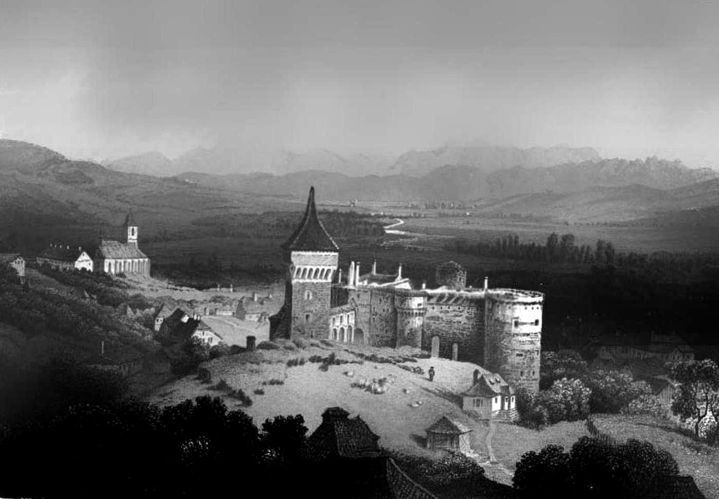 Vajdahunyad Magyarország és Erdély eredeti képekben: Rajzolta Rohbock Lajos. Történelmi és helyirati szöveggel. Irta Hunfalvy János, 1. kötet,1. kiadás